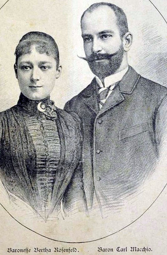 Karl von Macchio (1859-1945), österreichischer Diplomat, und Gattin